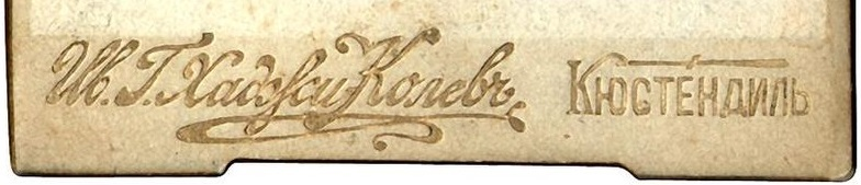 Фирма на Иван Хаджиколев